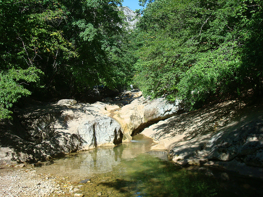 Углубления (ванны) на дне Каньона